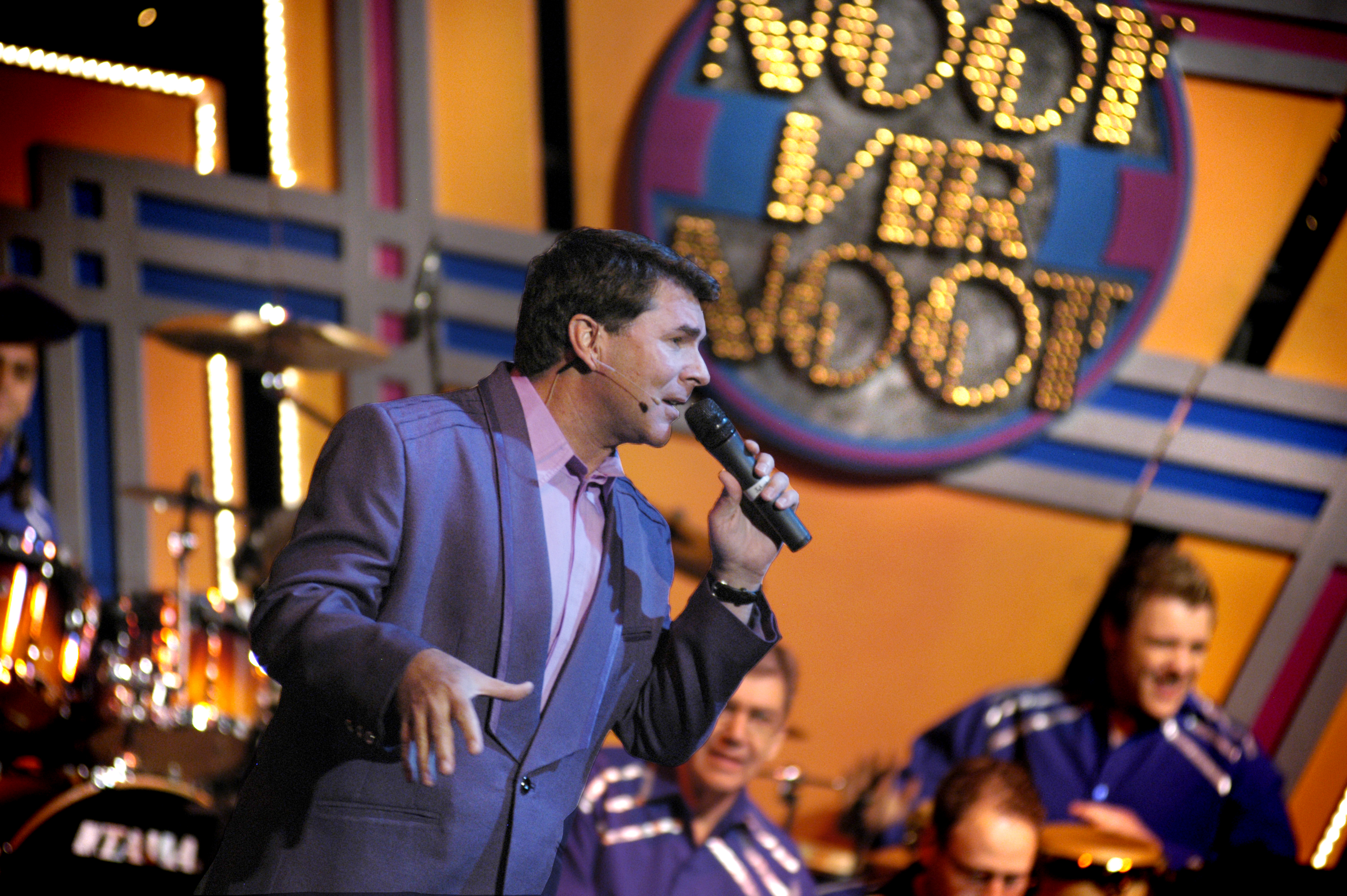 Noot vir Noot Roadshow